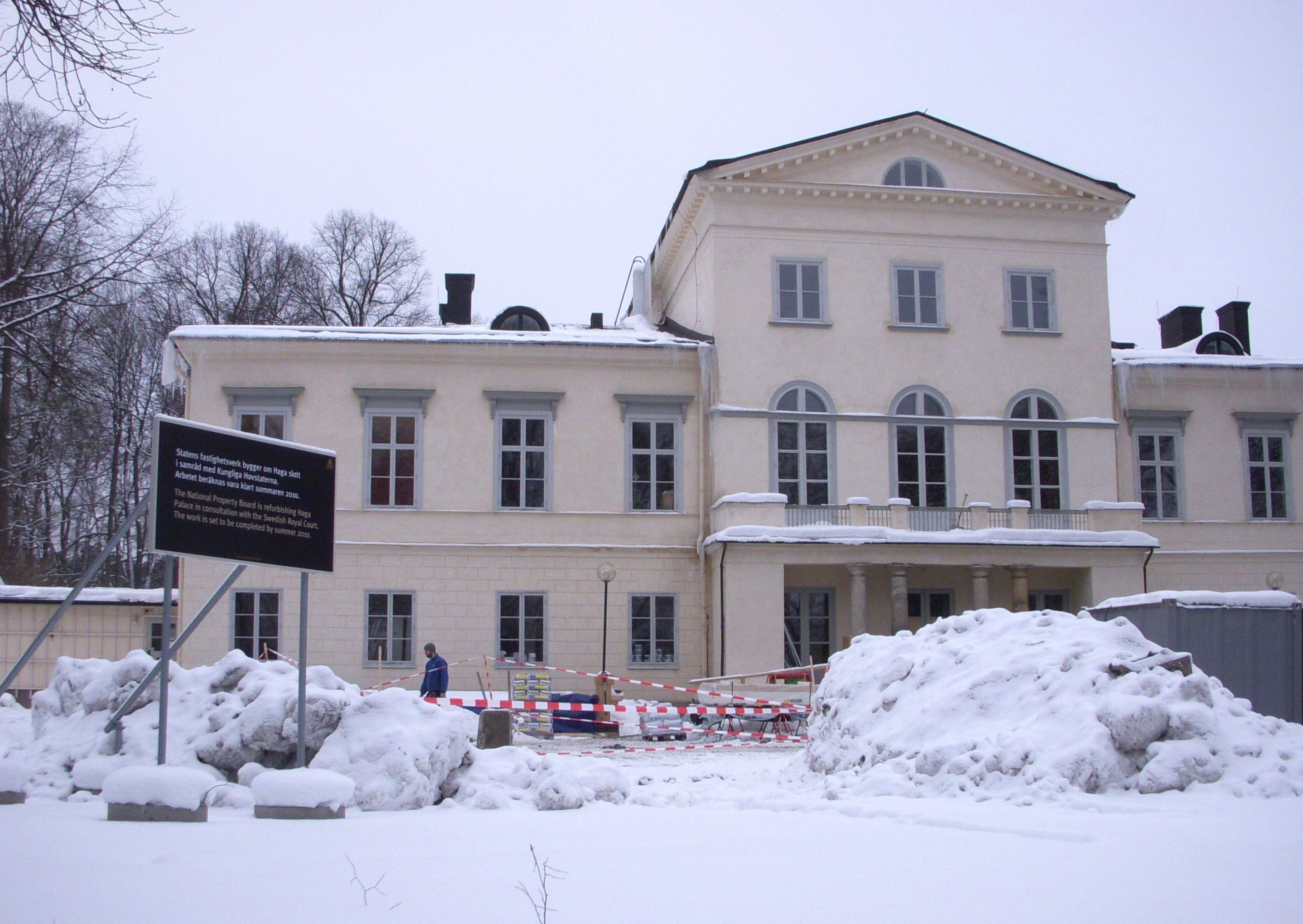 Haga slott i Hagaparken, ombyggnad februari 2010